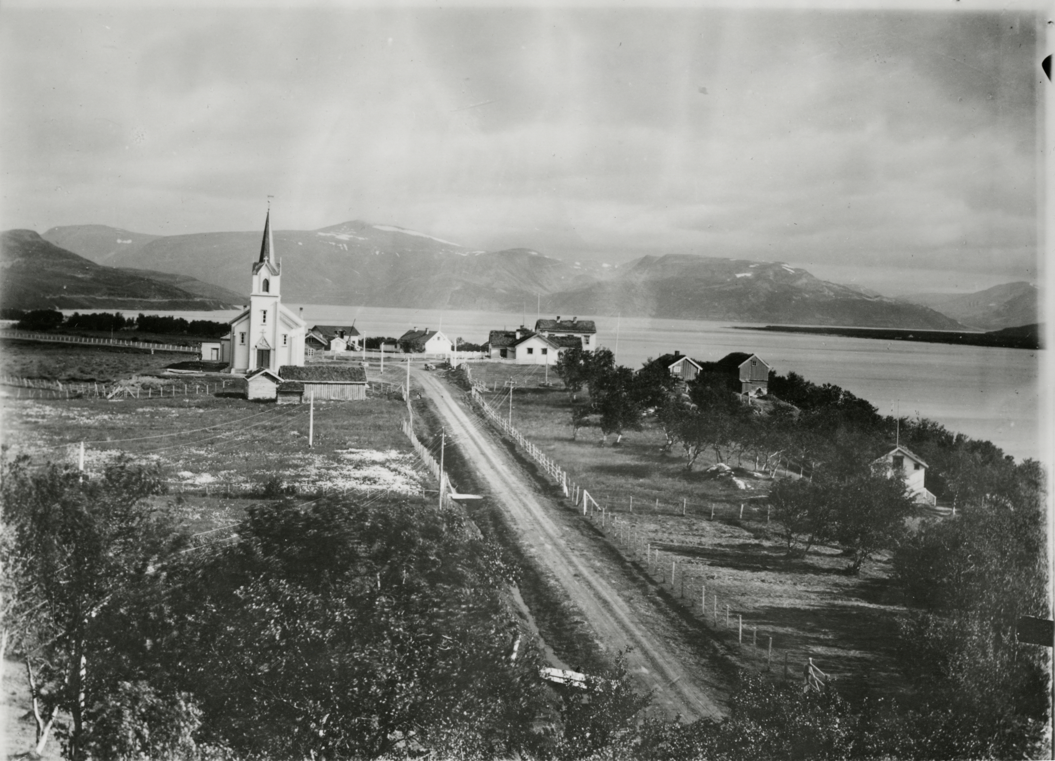 Tana i Tana, Finnmark Oversiktsbilde, Tana kirke, brent 1944